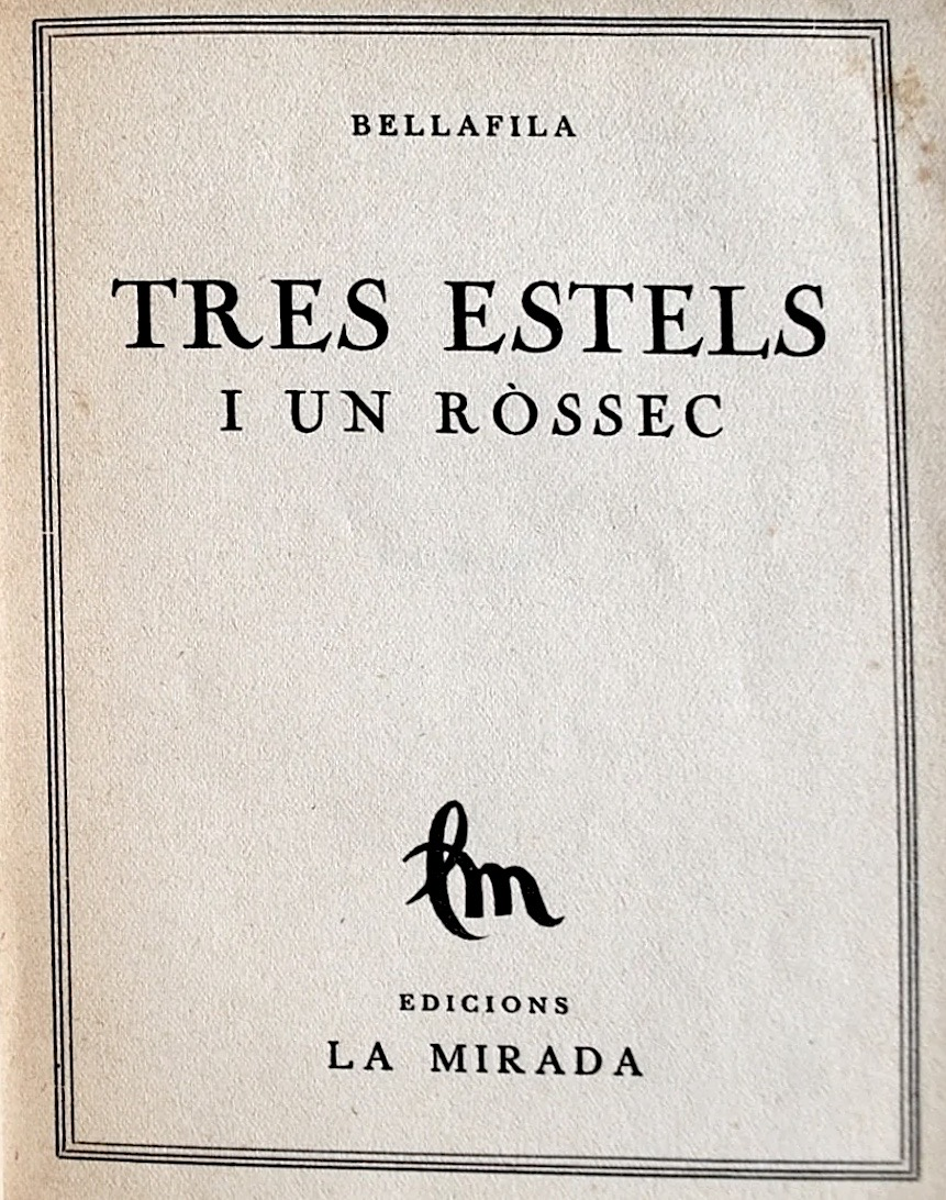 Portada de Tres estels i un ròssec de Bellafila, edicions La Mirada, impremta Sallent